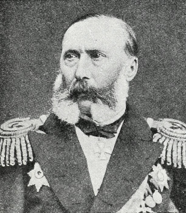 Это изображение было использовано для иллюстрирования статьи «Керн, Федор Сергеевич» опубликованной в двенадцатом томе «Военной энциклопедии», который был издан книгоиздательским товариществом И. Д. Сытина в 1913 году в столице Российской империи городе Санкт-Петербурге. Более подробное описание к этой картинке можно прочесть в указанной выше статье.